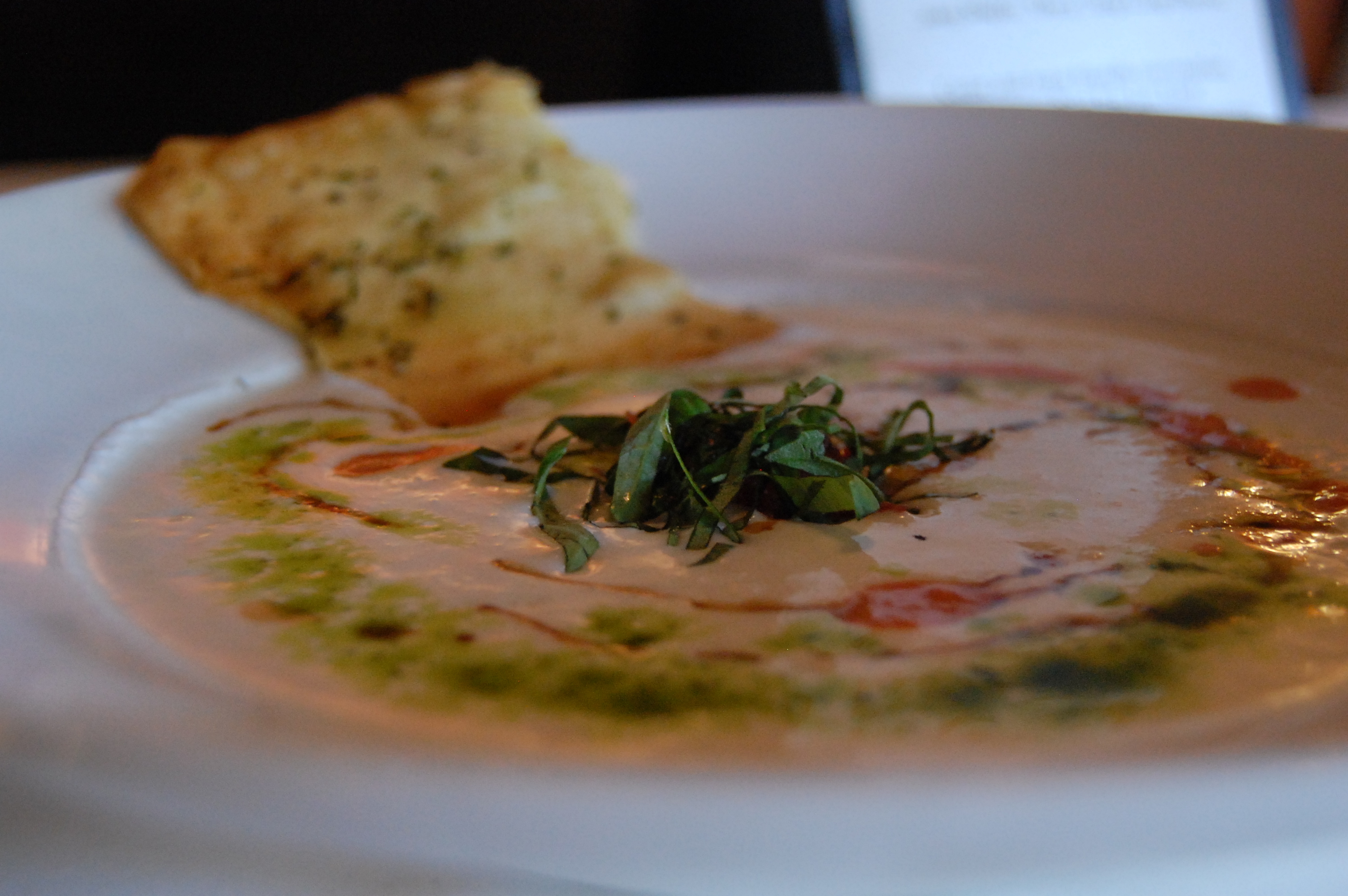 mozzarella soup